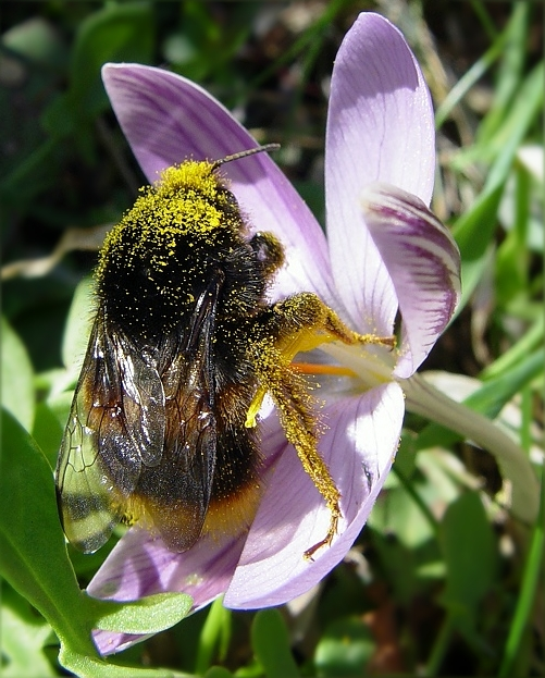 Шмель на крокусе, остров Корсика.